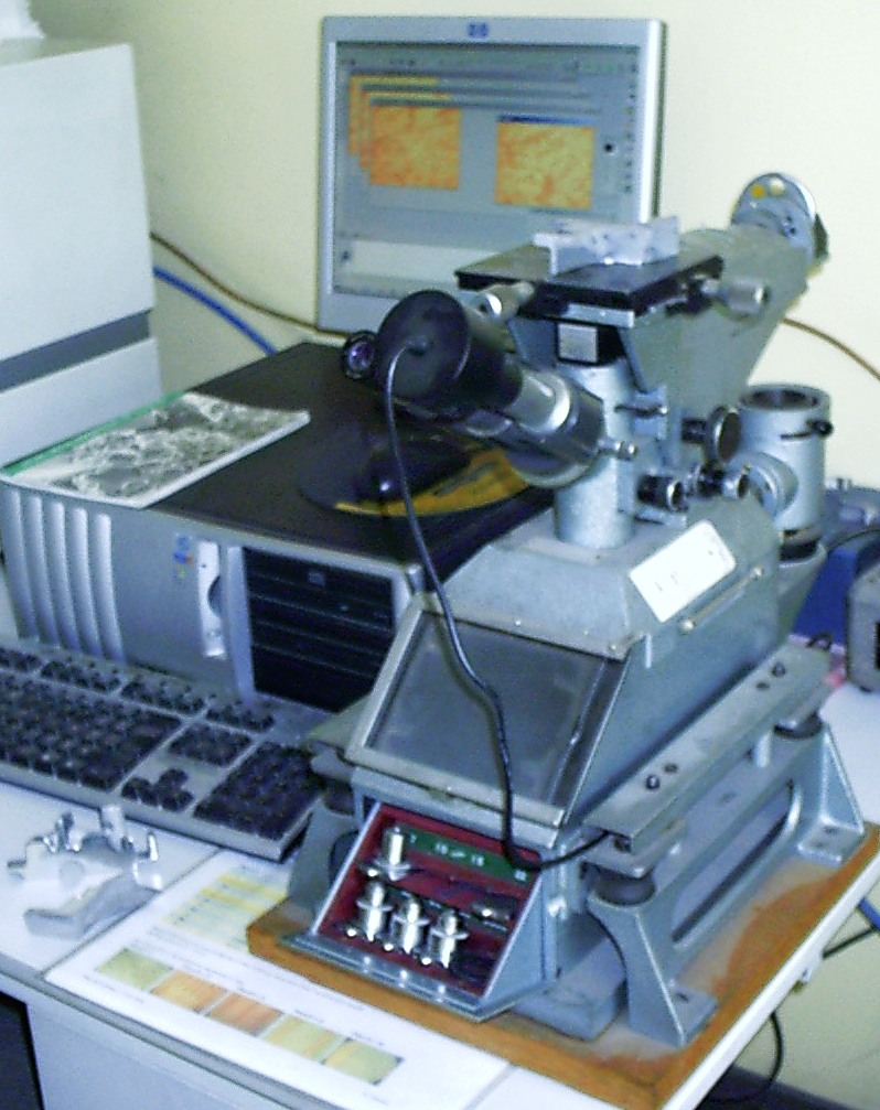 Microscope métallographique NACHET TM75 (anneé de fabrication : 1959, c'est increvable, ces trucs là...) équipé d'une caméra numérique (année de fabrication : 2005) pour prises de vues micrographiques. Photo prise par mes soins pour illustrer l'article Micrographie